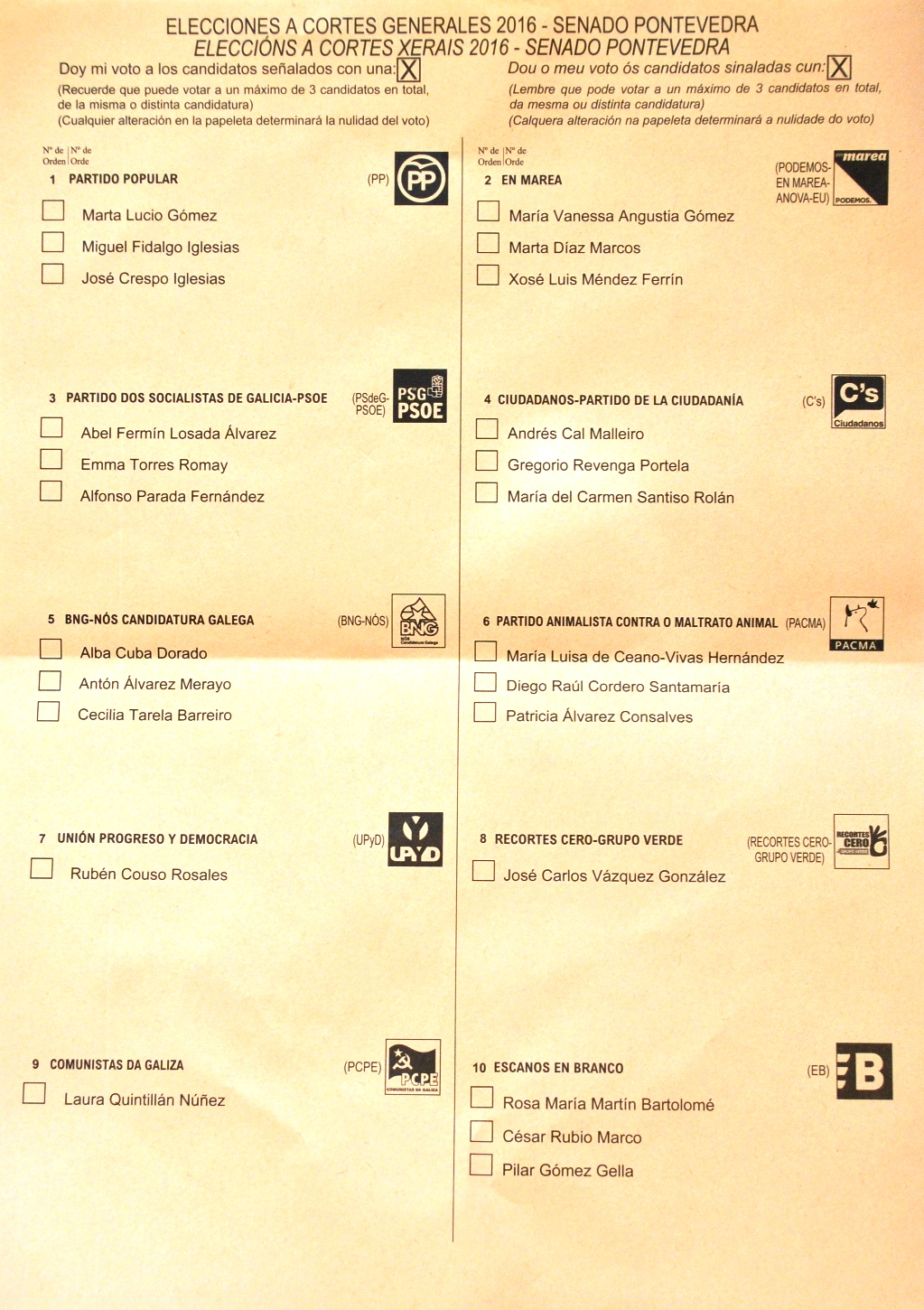 Papeleta electoral de las Elecciones a Cortes Generales de España de 2016, Provincia de Pontevedra.